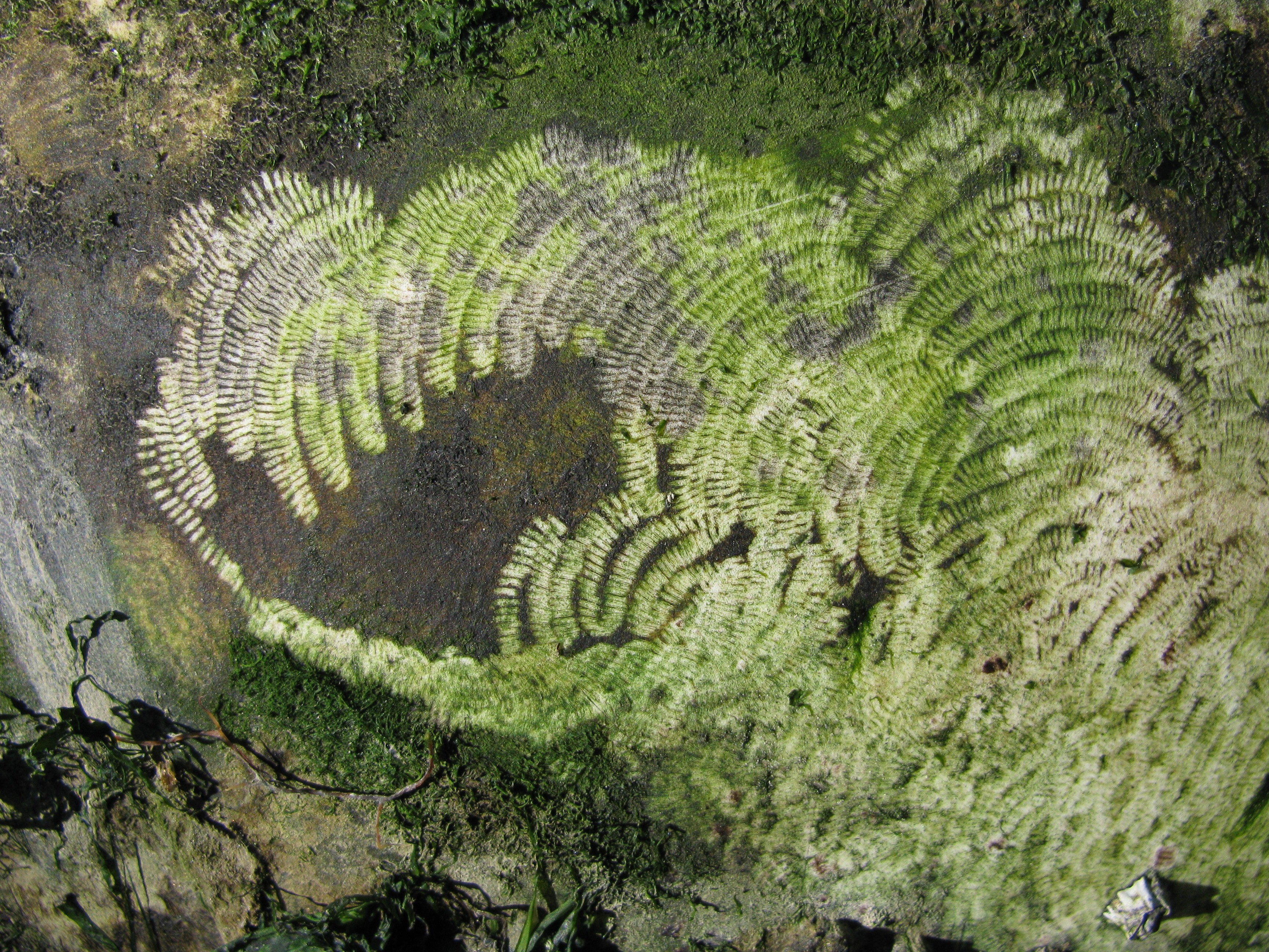 Chaque trait blanc correspond au passage de la radula sur le sol et au prélèvement de la pellicule d'algues. Après chaque passage l'animal décale légèrement la tête vers la gauche ou vers la droite.English